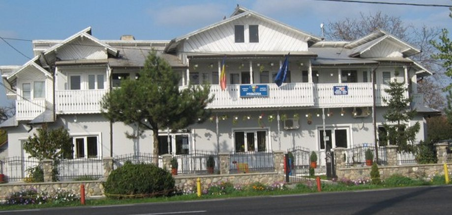 Primăria satului Bucu, Ialomița